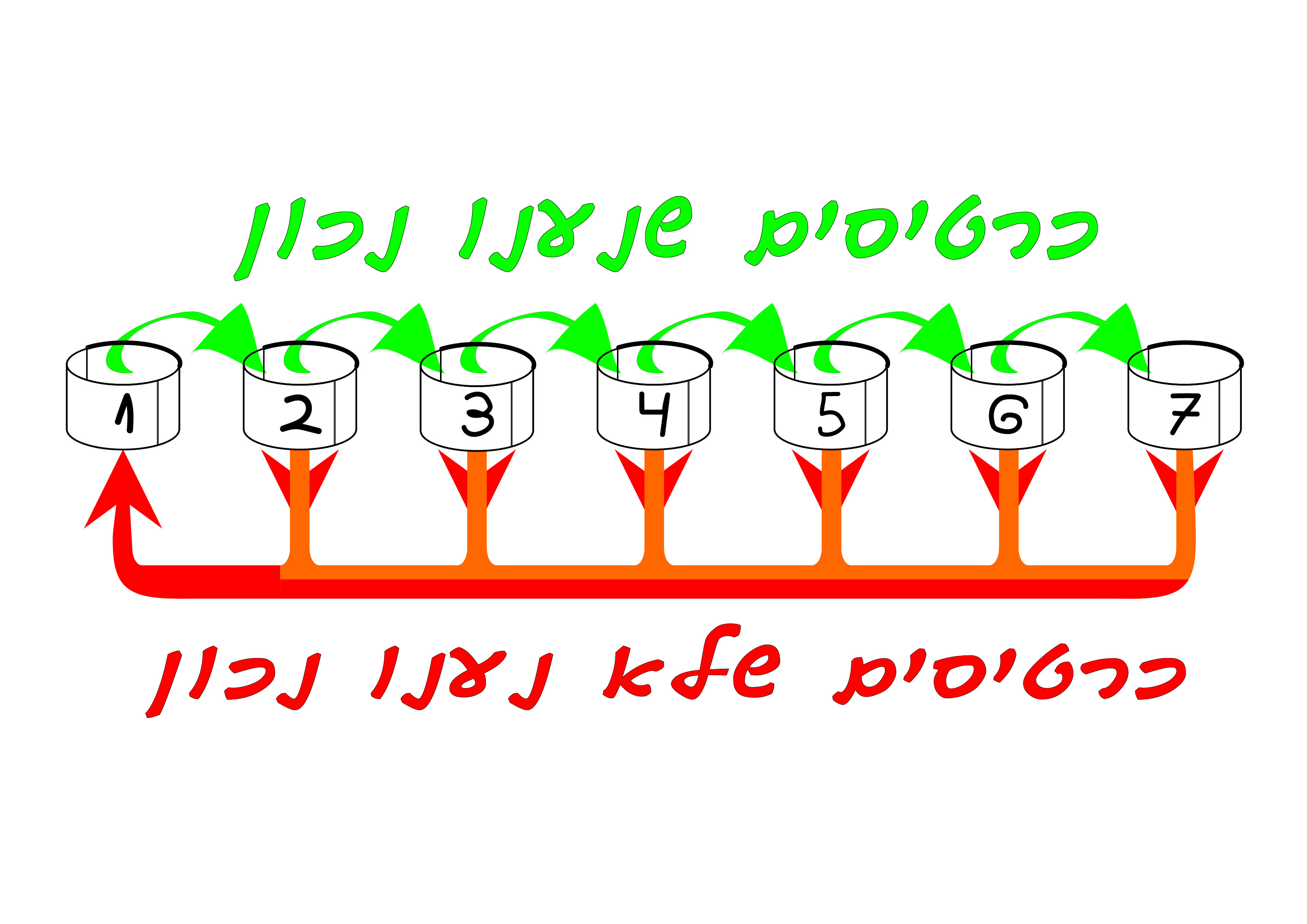 תמונה המתארת את השיטה